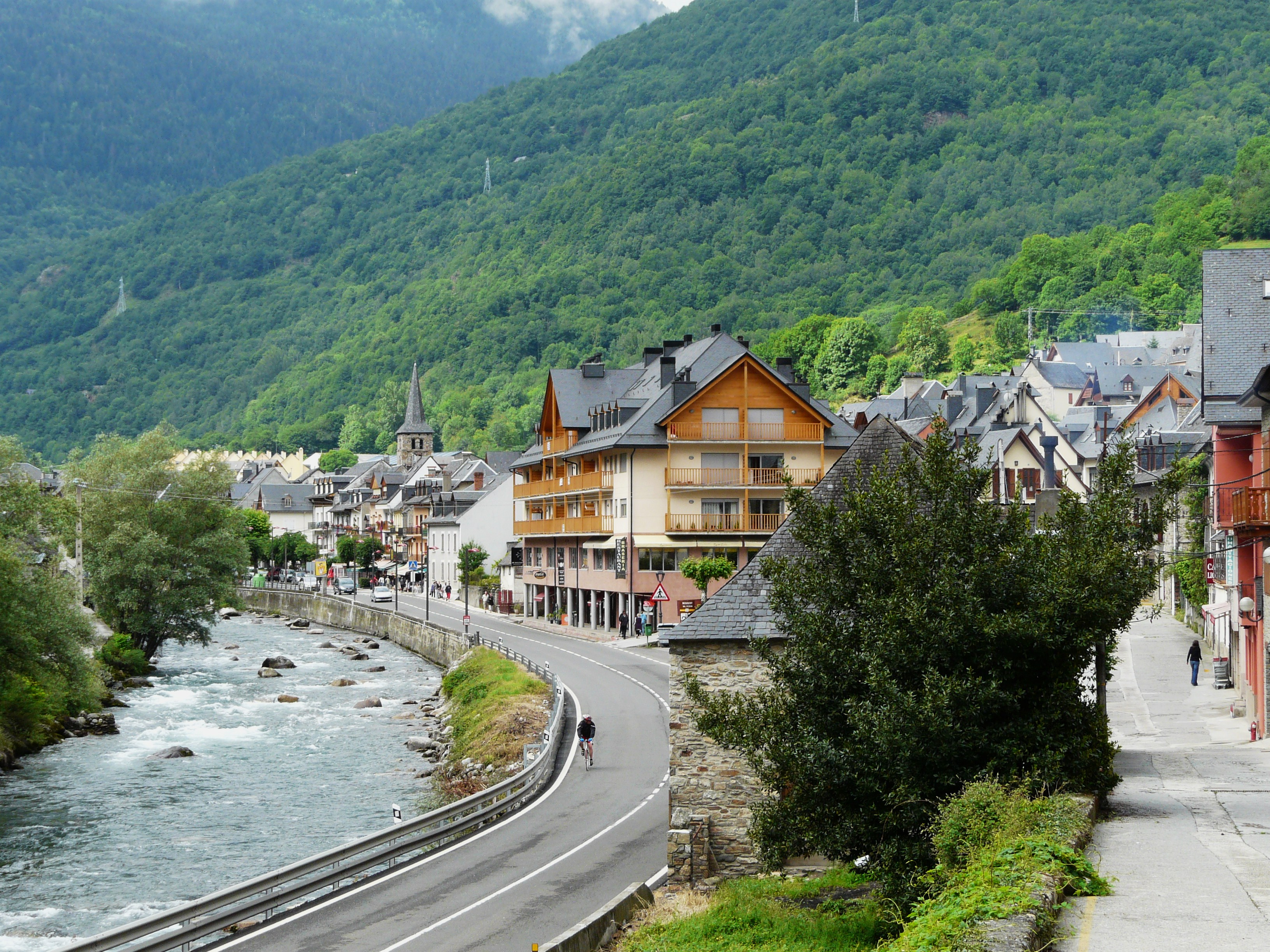 Le village de Bossòst traversé par la Garonne, Val d'Aran, Catalogne, Espagne.